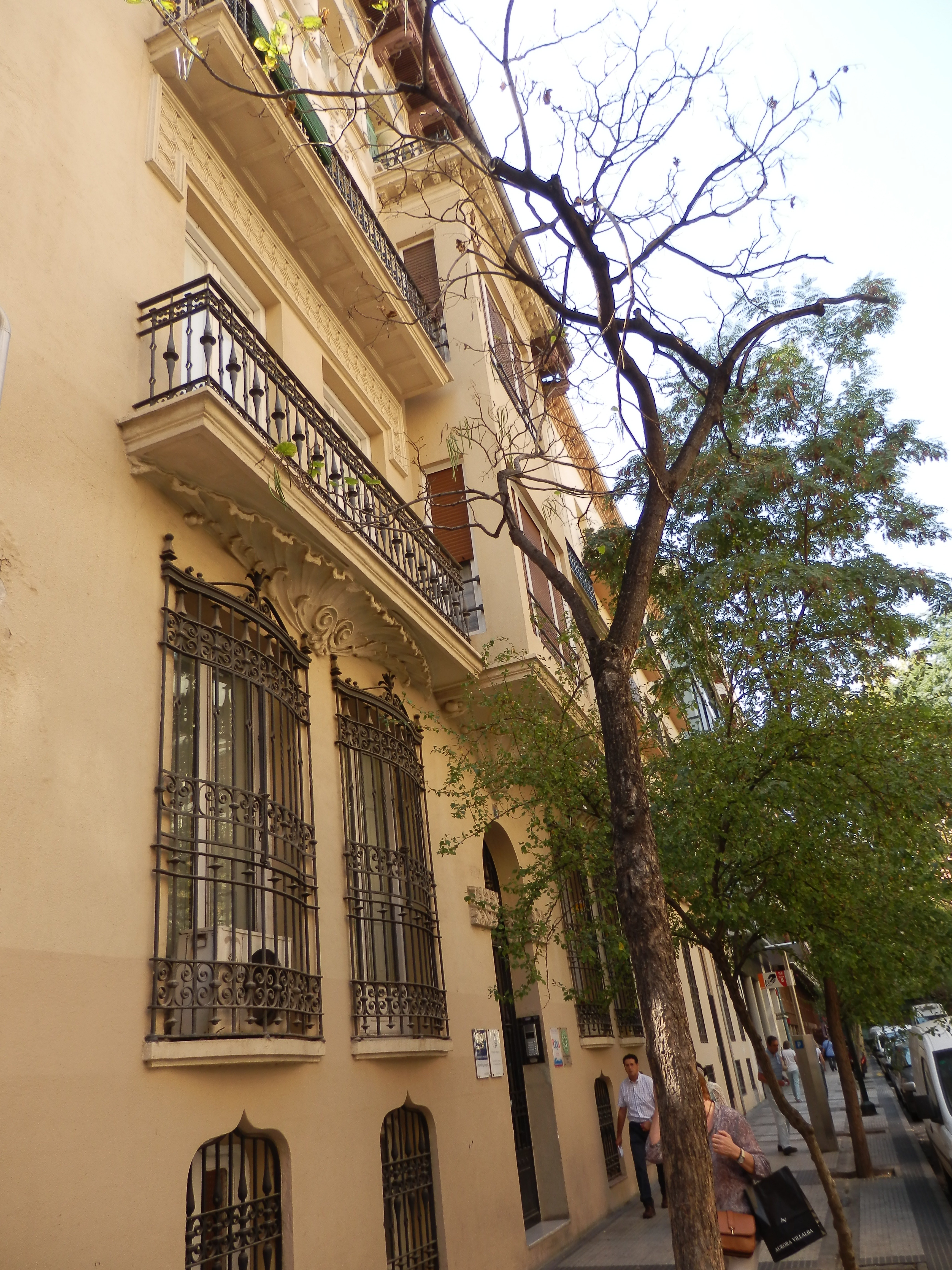 Edificio de viviendas situado en la calle Almagro, 5, de Zaragoza, España. Es bien de interés cultural (BIC) de la provincia de Zaragoza.